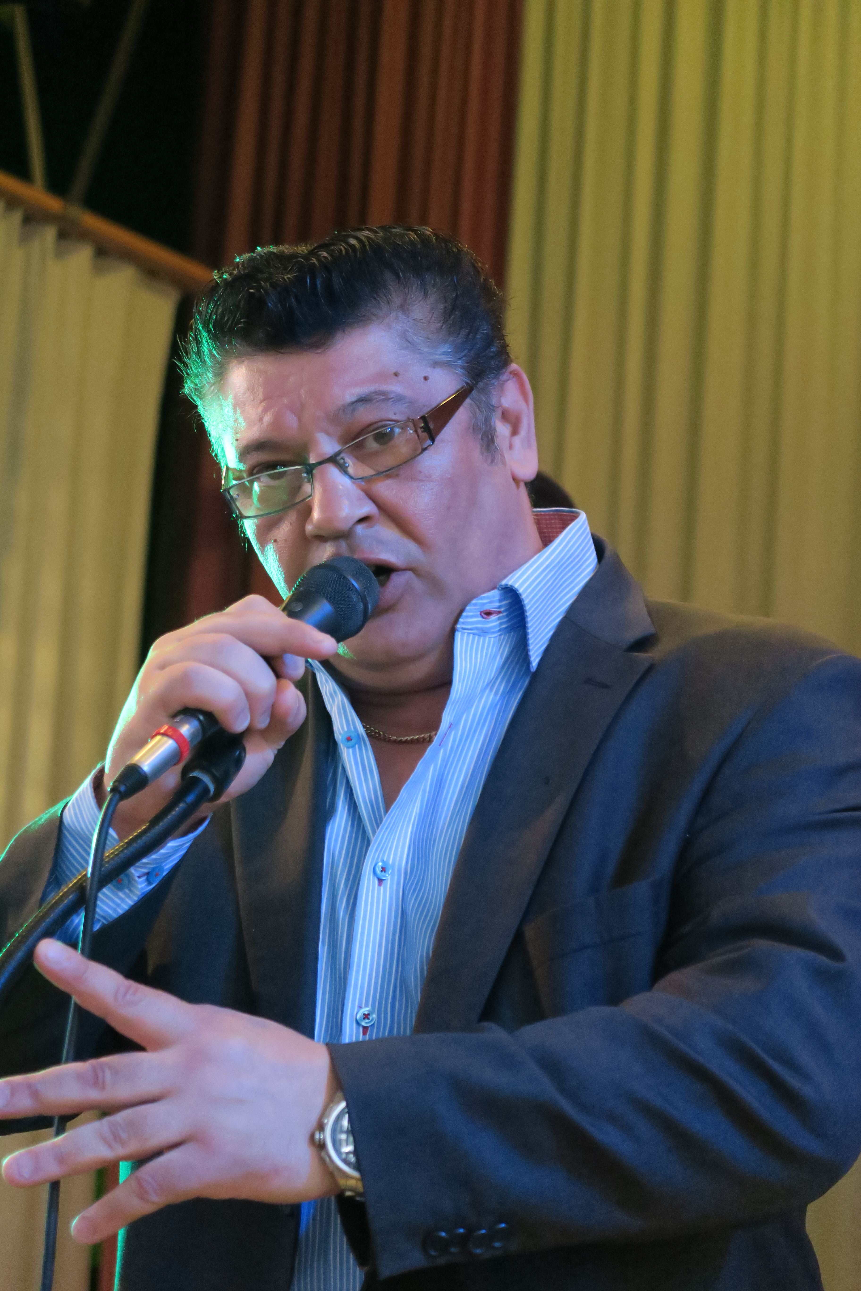 Rainer Bollström suomalainen laulaja